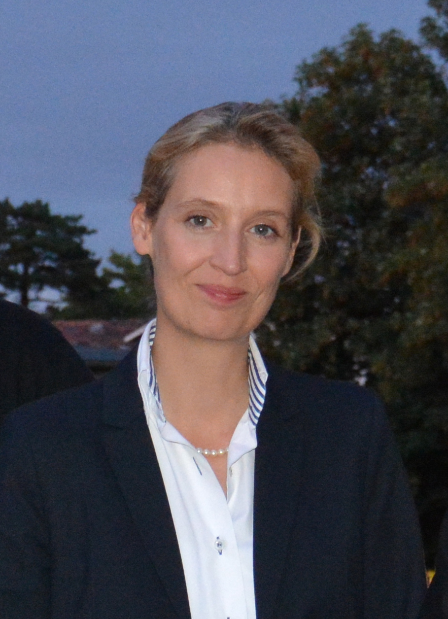 Alice Weidel (Anlässlich eines Vortrages im August 2016 in Wismar)